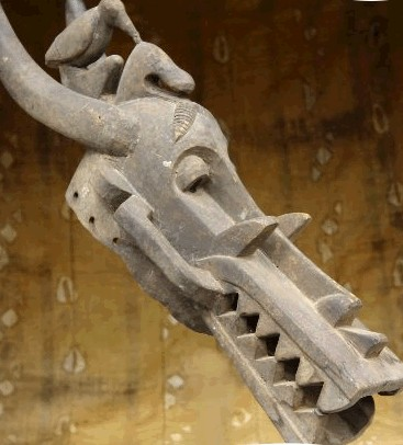 masque waniugo du nord de la Cote d'Ivoire